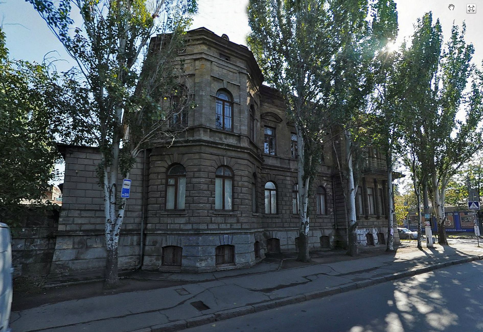 Николаев. ул. Бульварная (совр. Пушкинская), № 4.